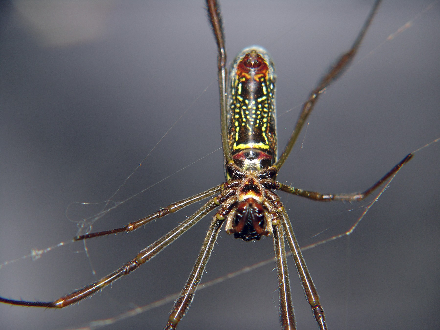 Aranha e sua teia, Avaré